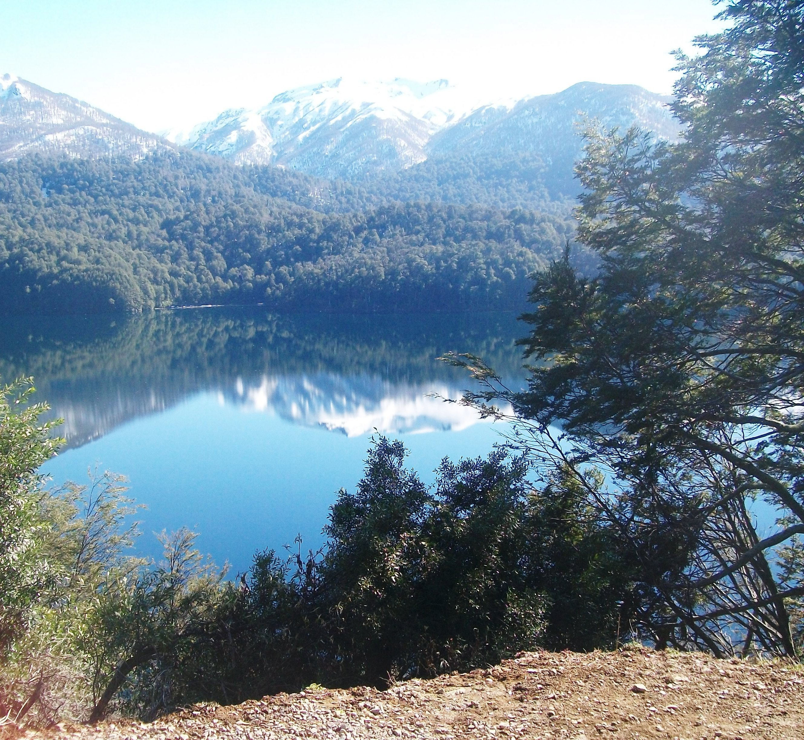 Lago Villarino visto desde el mirador del camino de los 7 lagos, Neuquén, Argentina